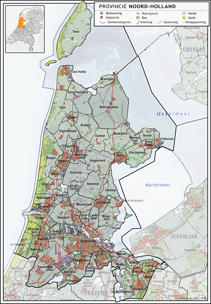 Provincie Noord-Holland (2008) met indeling van gemeenten en impressie van het landschap.